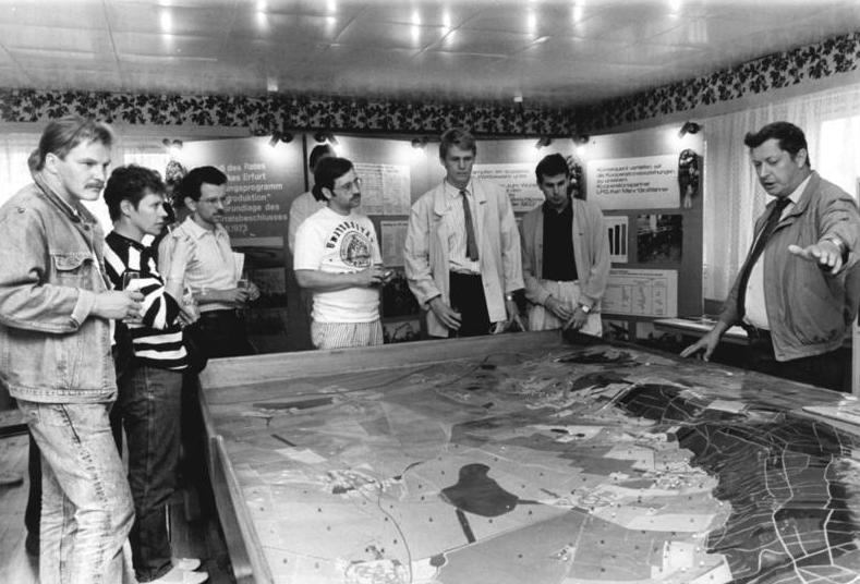 LPG Gierstädt, Besuch einer finnischen Jugenddelegation ADN-ZB Ludwig-B-6.8.88- Bezirk Erfurt: Finnische Jugendliche besuchten LPG- Die Delegation zur 6. Woche der Jugend der Republik Finnland in der DDR war zu Gast bei den Bauern der LPG "Fahner Obst" Gierstädt. Im Informationszimmer des landwirtschaftlichen Betriebes gab LPG-Vorsitzender Peter Brückner (r.) der von Matti Vanhanen (3.v.r.) geleiteten Delegation notwendige Erläuterungen. Vgl. 1988-0806-9N!